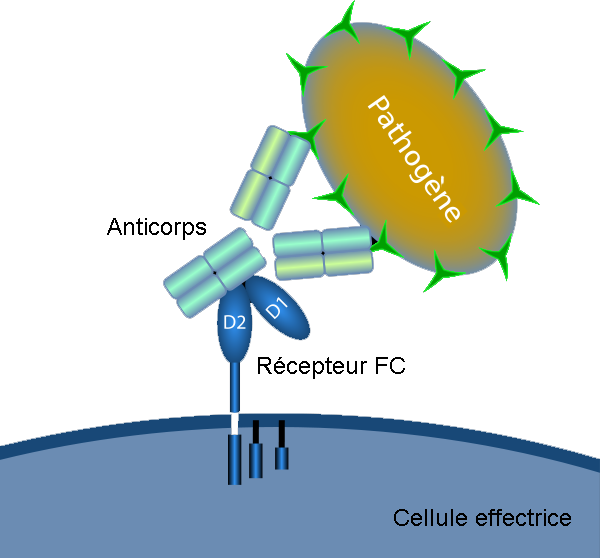 Schéma d'un récepteur FC